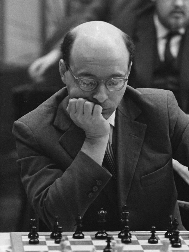 David Bronstein